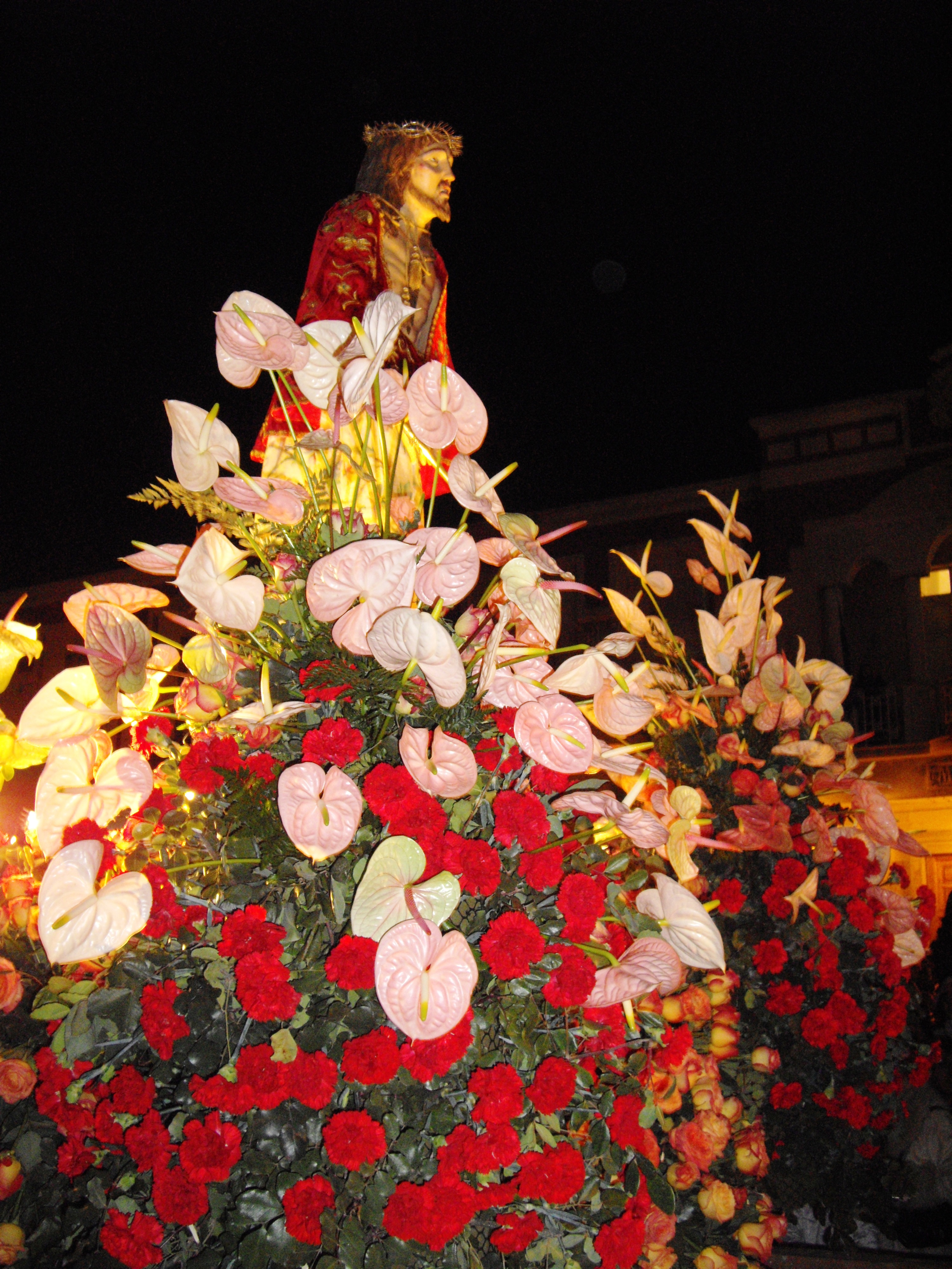 Pasqua 2009